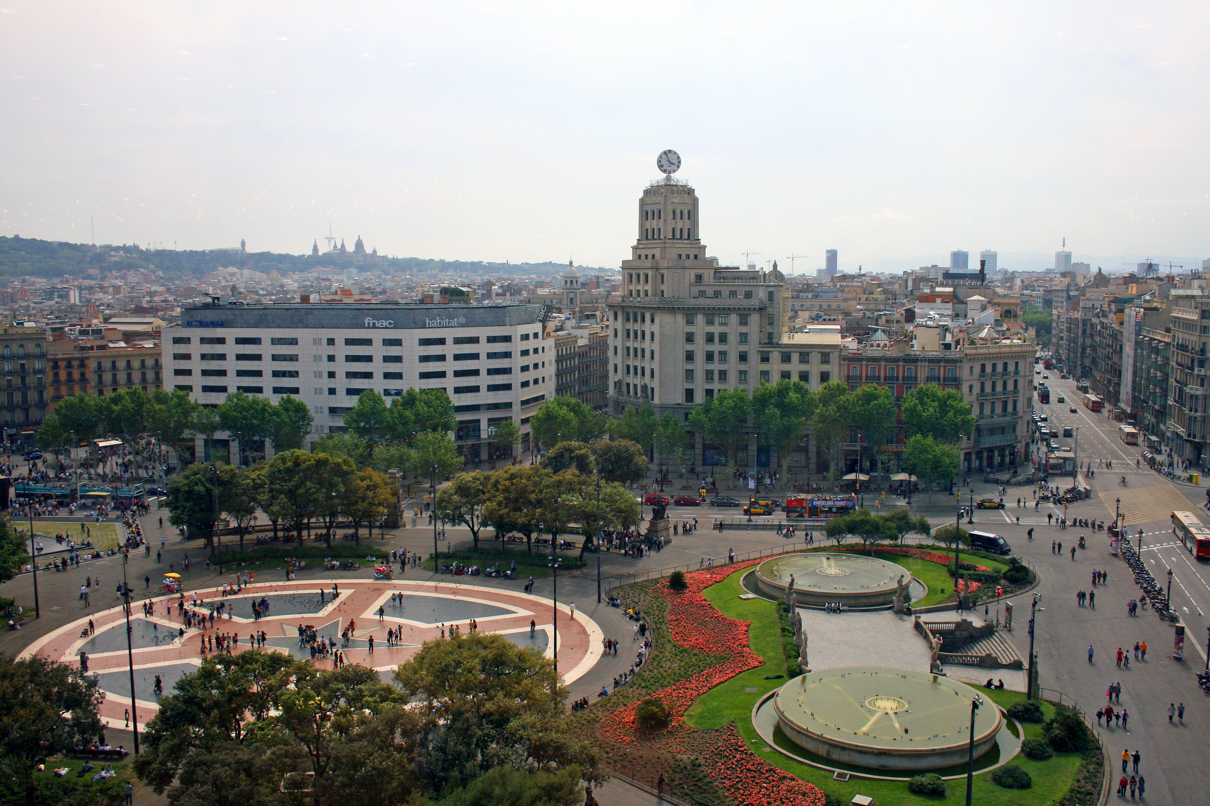 Plaça Catalunya, a Barcelona, Espanya.